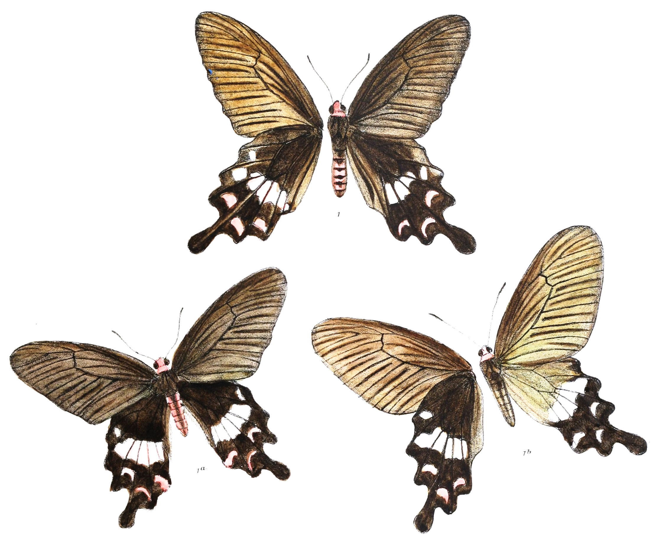 Atrophaneura adamsoni